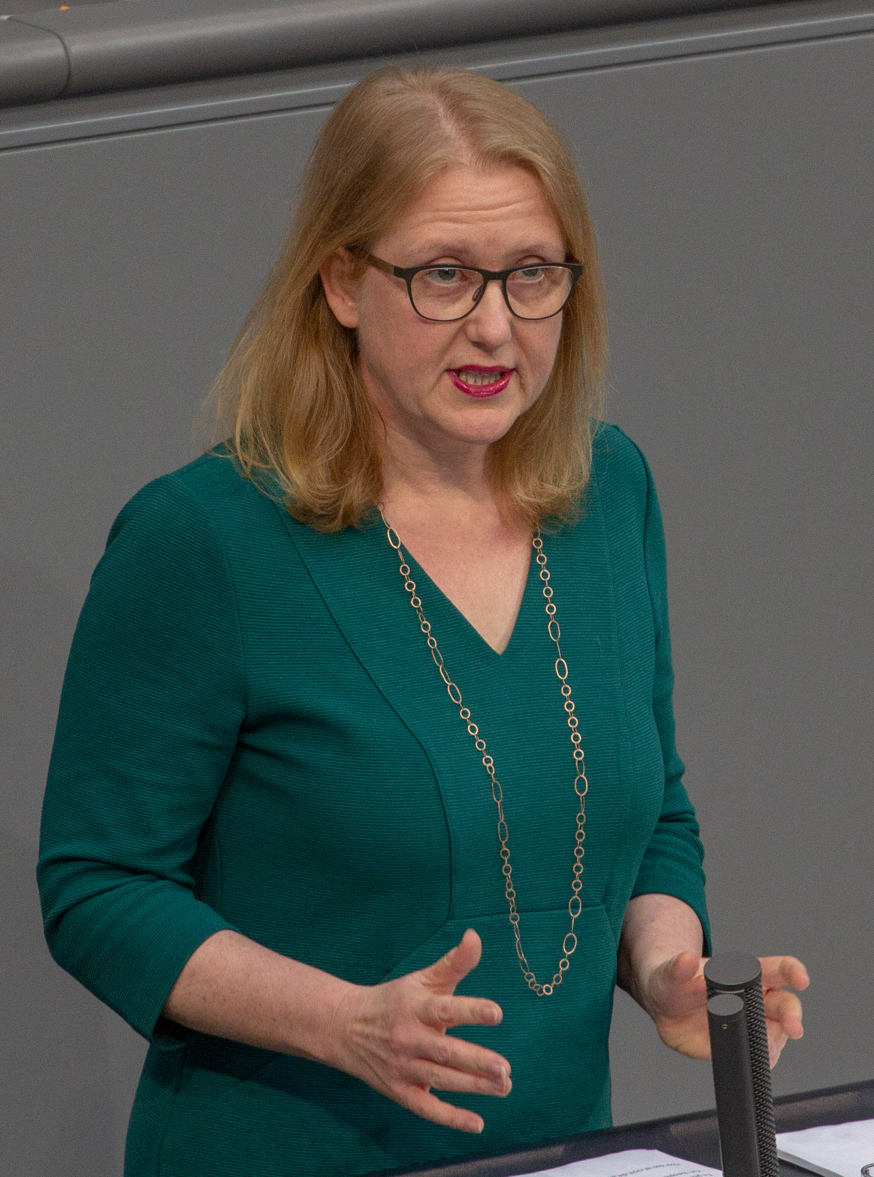 Lisa Paus, Mitglied des Deutschen Bundestages, während einer Plenarsitzung am 11. April 2019 in Berlin.